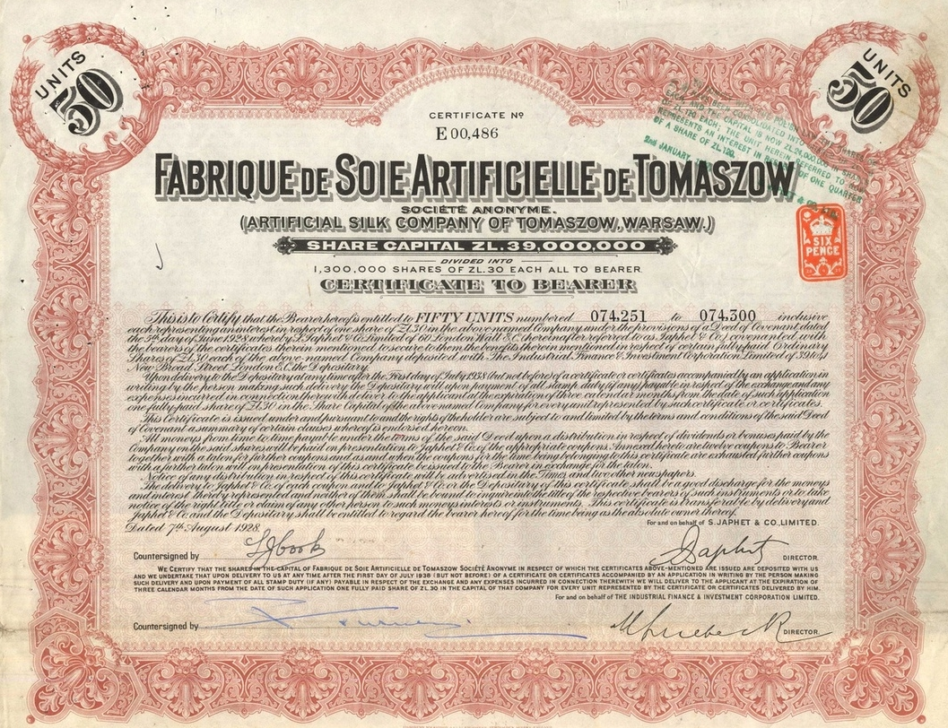 Tomaszów Mazowiecki w województwie łódzkim, PL, EU. 50 akcji Tomaszowskiej Fabryki Sztucznego Jedwabiu późniejszego Wistomu. CC0